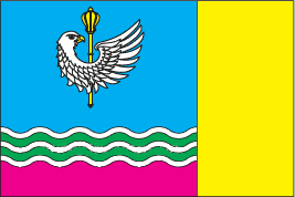 Прапор Вознесенського району